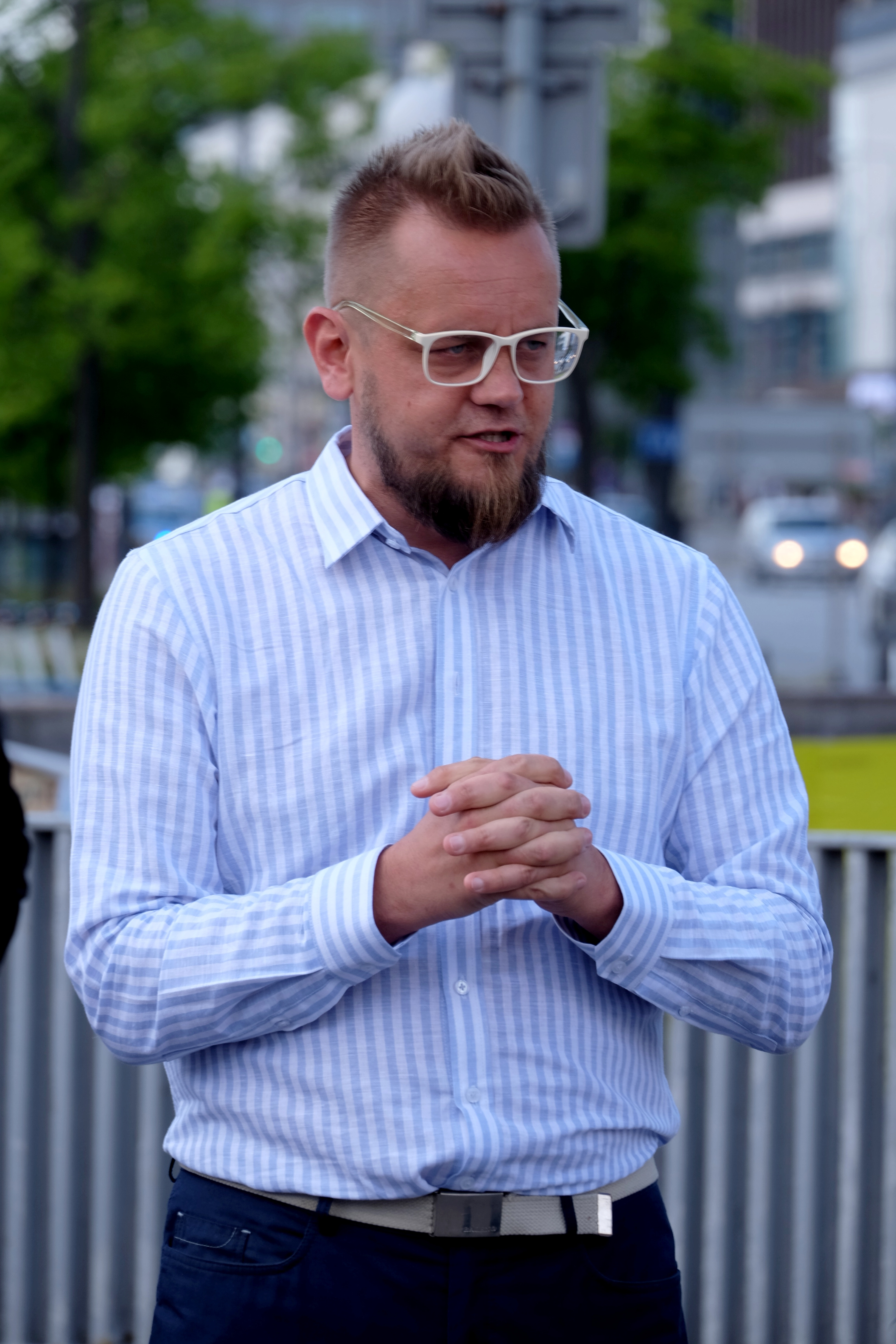 Paweł Tanajno przed wyborami prezydenckimi w 2020